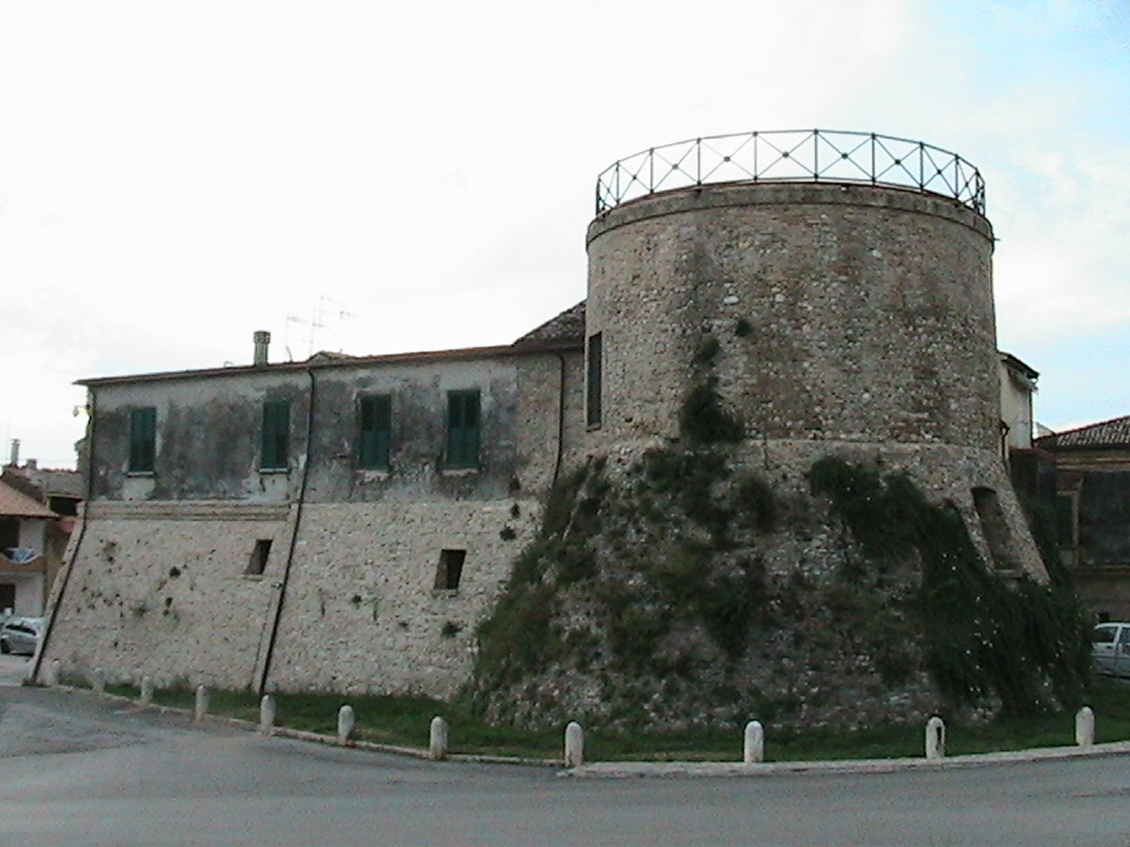 Giulianova - Torrione "Il Bianco"